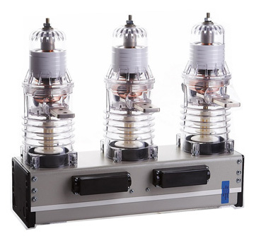 Вакуумный выключатель ВВ/TEL 6-10 кВ